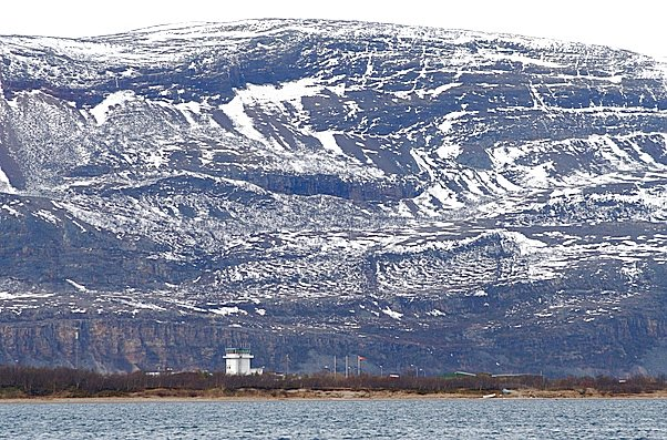 Lakselv Airport - 2